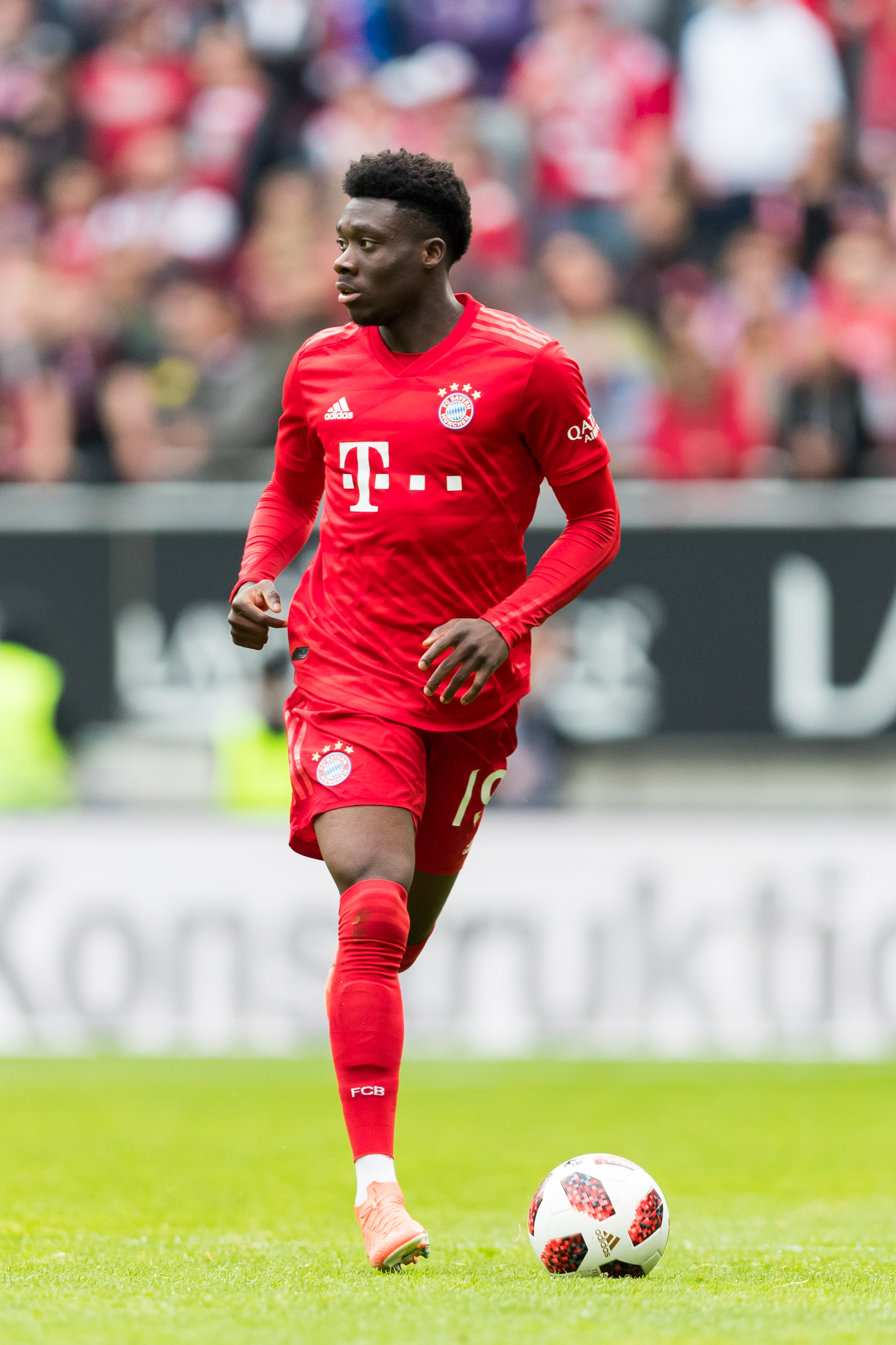 during 1.FC Kaiserslautern vs FC Bayern München at Fritz-Walter-Stadion, Kaiserslautern, Rheinland-Pfalz, Germany on 2019-05-27, Photo: Sven Mandel